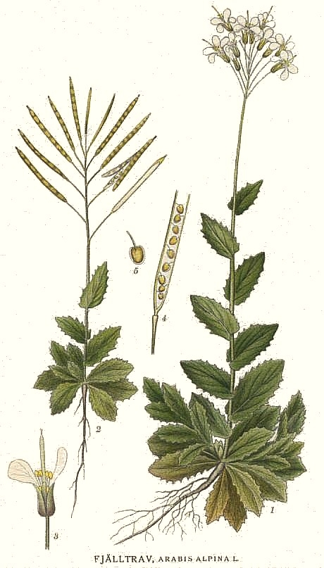 Original Description Fjälltrav, Arabis alpina L.